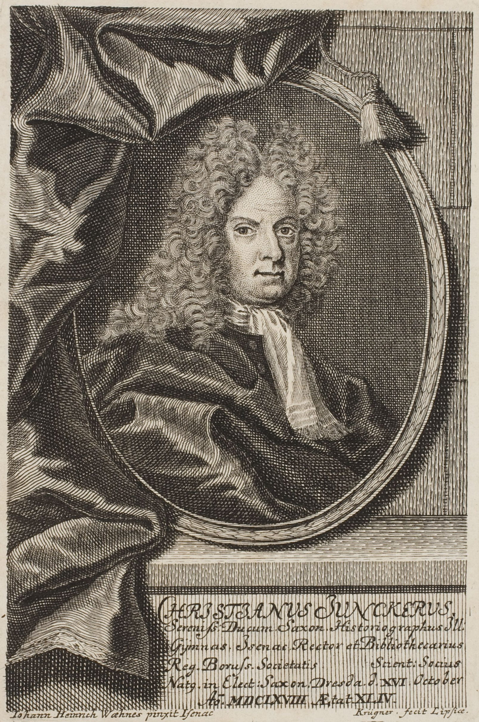 Portrait Christian Juncker; Wolfenbüttel, Herzog August Bibliothek, Inventar-Nr. A 10751